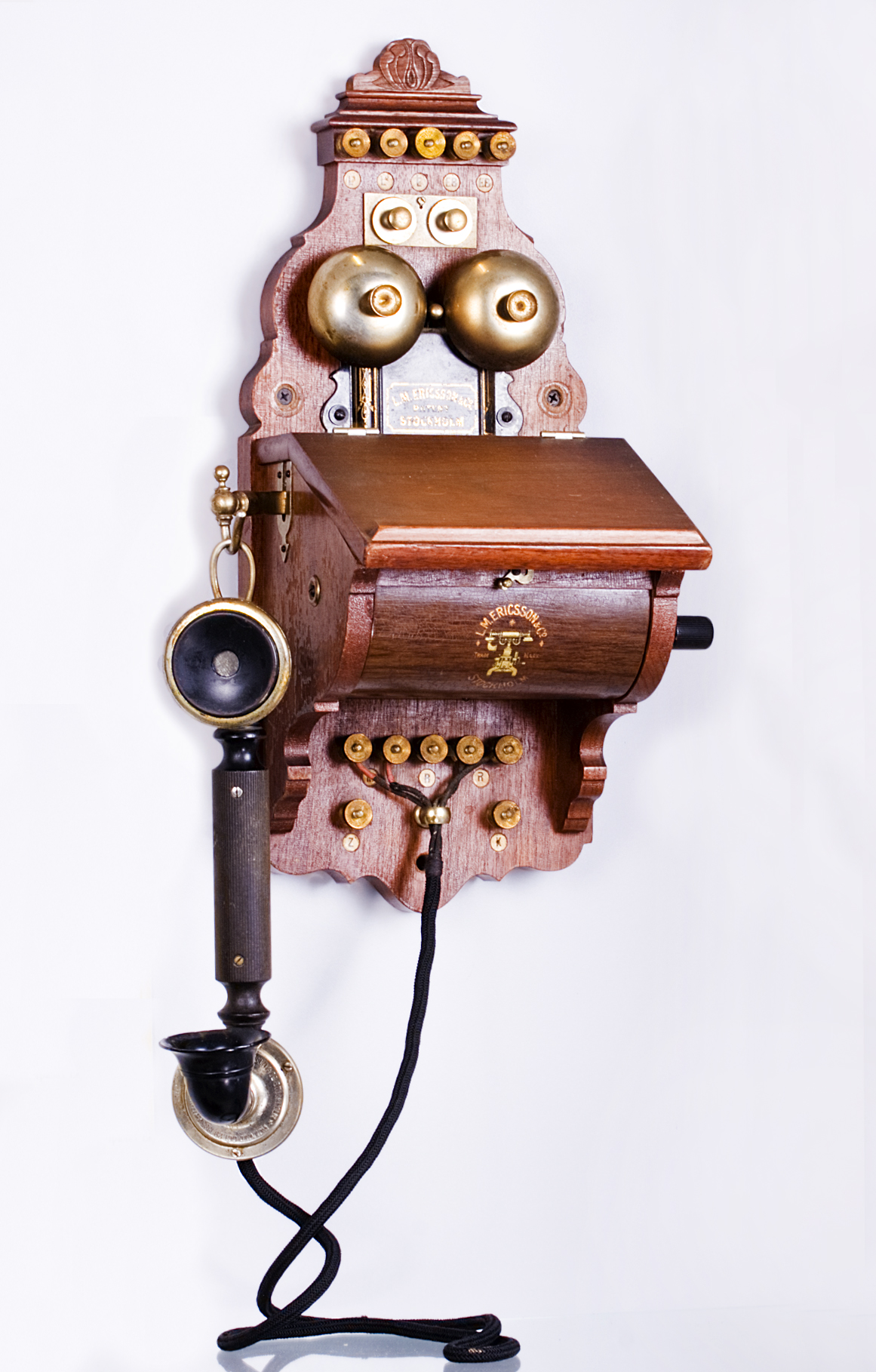 Экспонаты Музея истории телефона The exhibits of the Museum of Telephone History